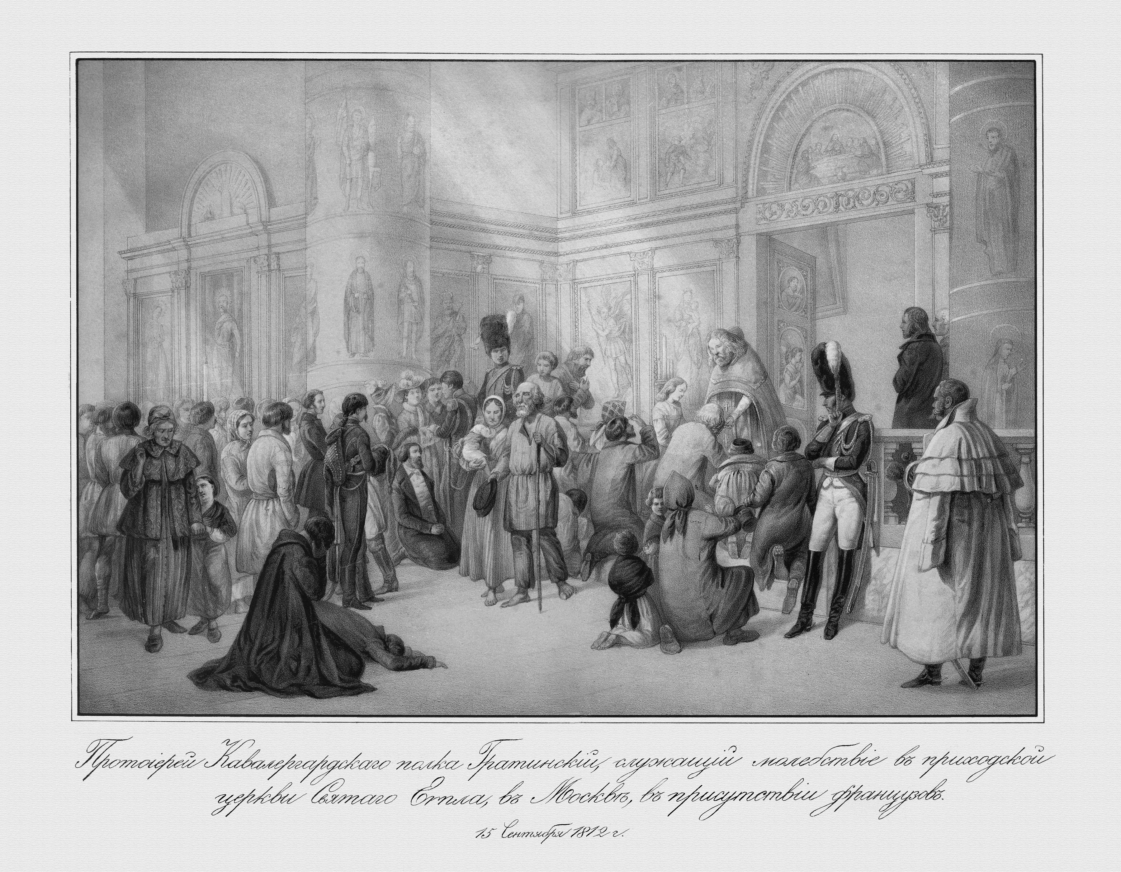 Lithographie représentant un Te Deum célébré par l'archiprêtre Gratinskij du régiment des Chevaliers Gardes, à Moscou, en présence des soldats Français. Paroisse St Evpla le 15 septembre 1812 (calendrier julien)